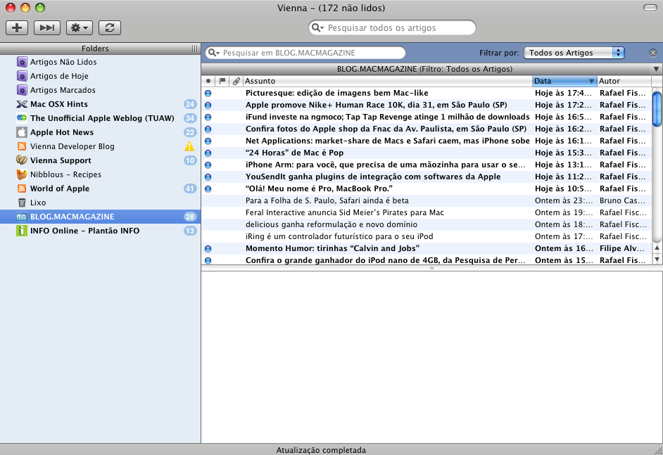 Agregador Vienna no Mac OS X v10.2.O Vienna é um software livre licenciado em Apache v2.0.